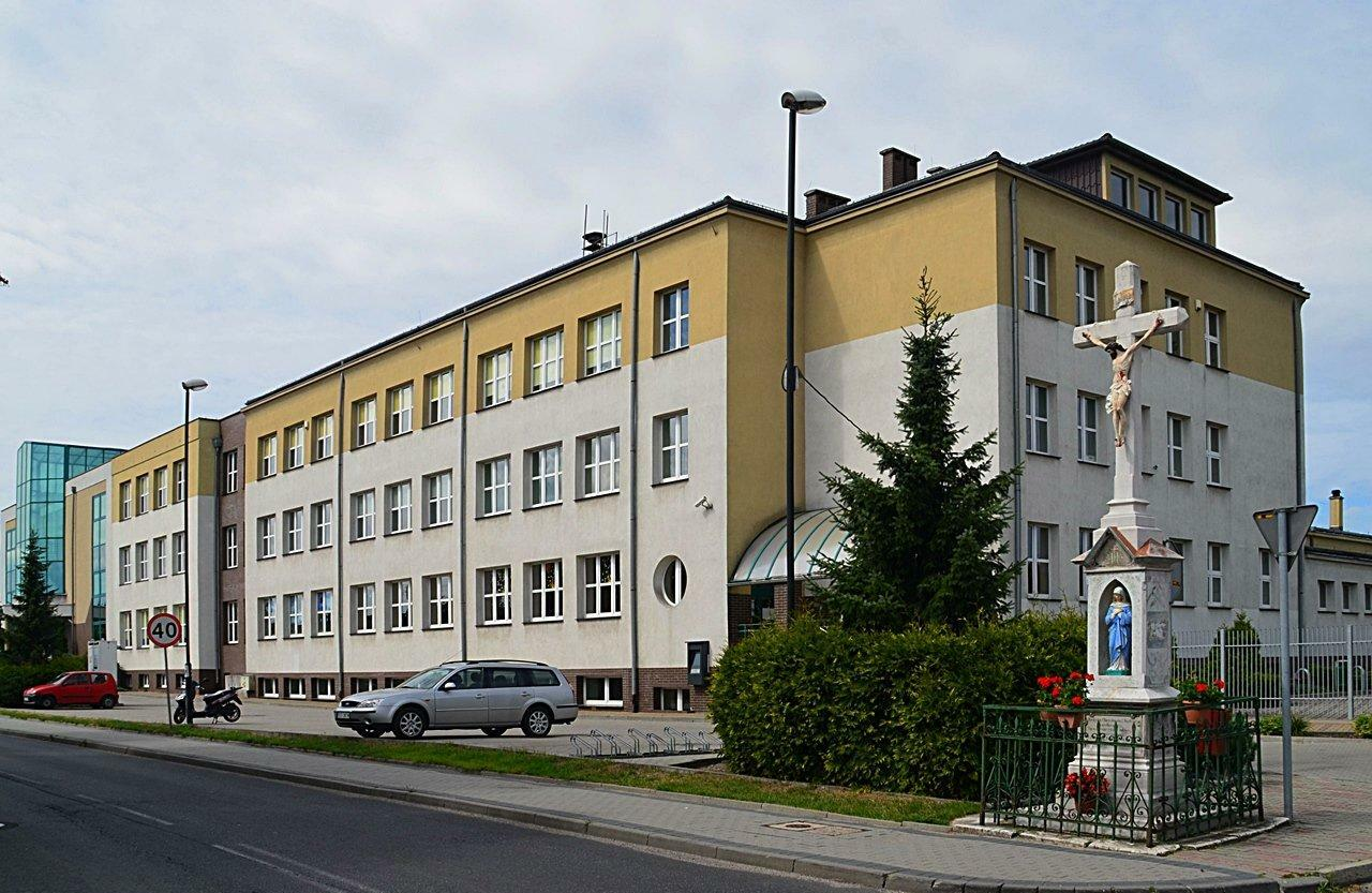 Gimnazjum publiczne nr 2 im. Czesława Niemena